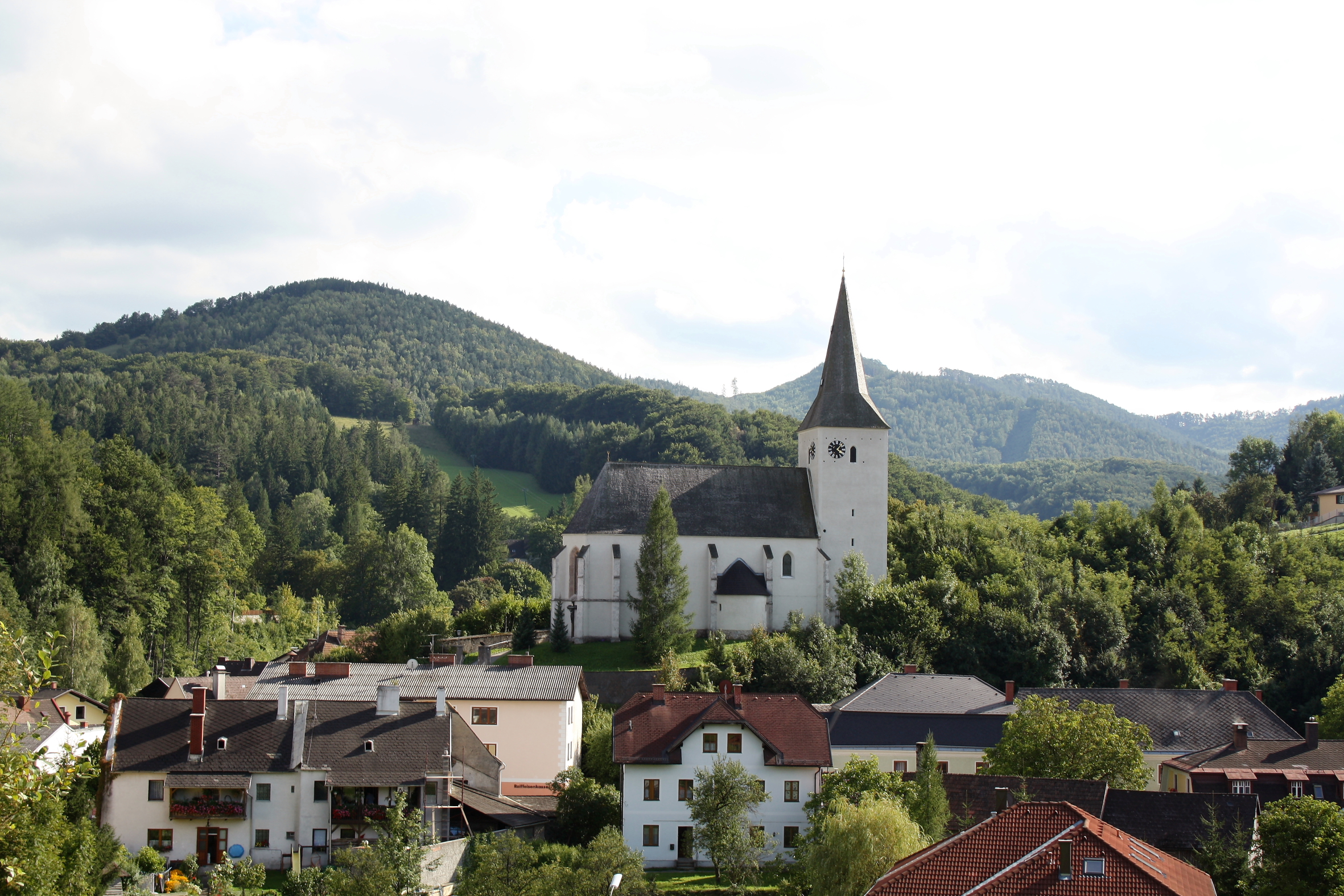 Nordansicht der Pfarrkirche in der niederösterreichischen Gemeinde Kaumberg.